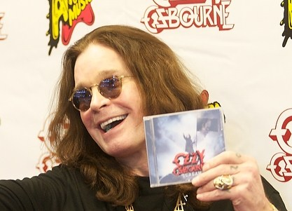 Ozzy Osbourne con su disco Scream.